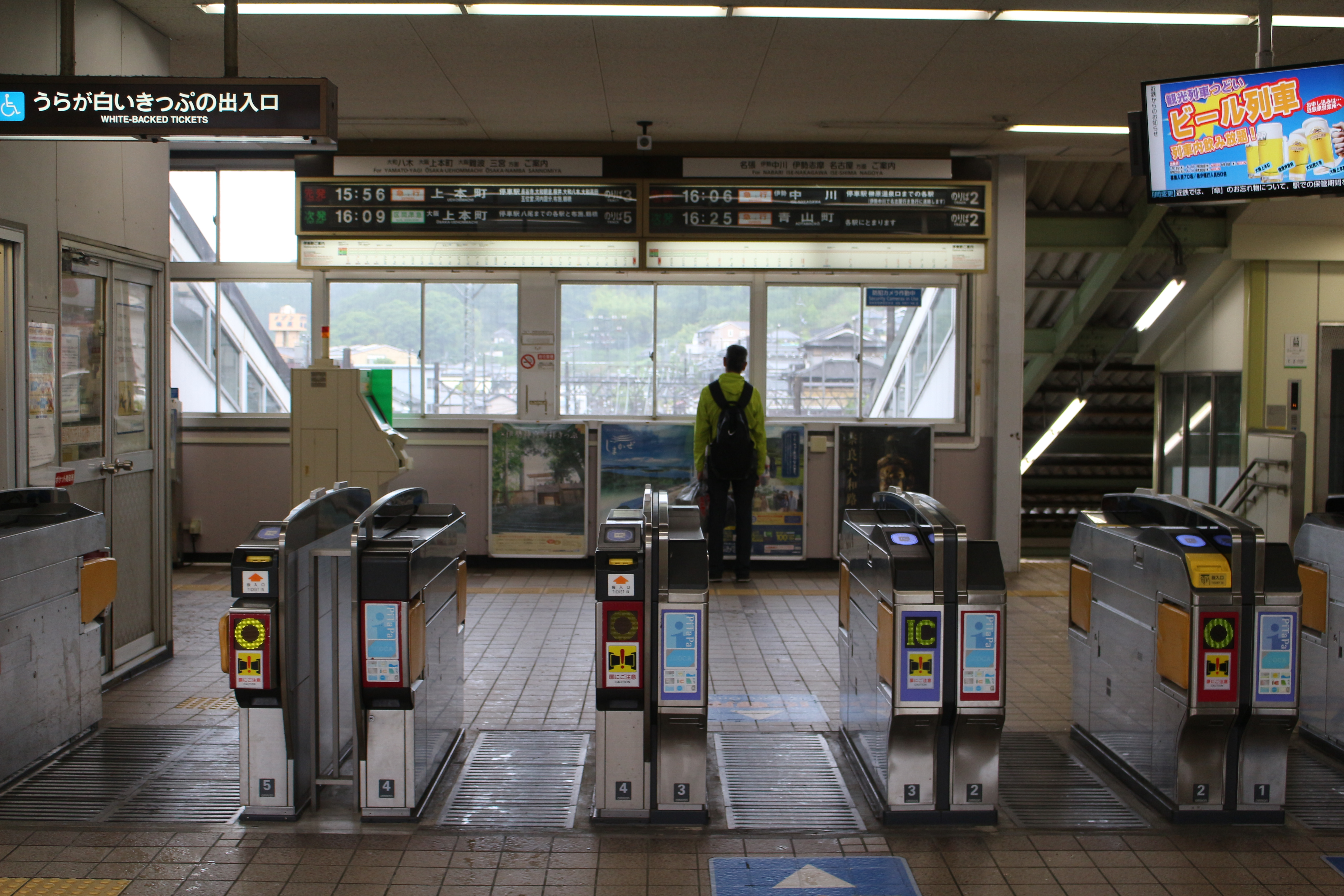 榛原站閘口（2018年6月）